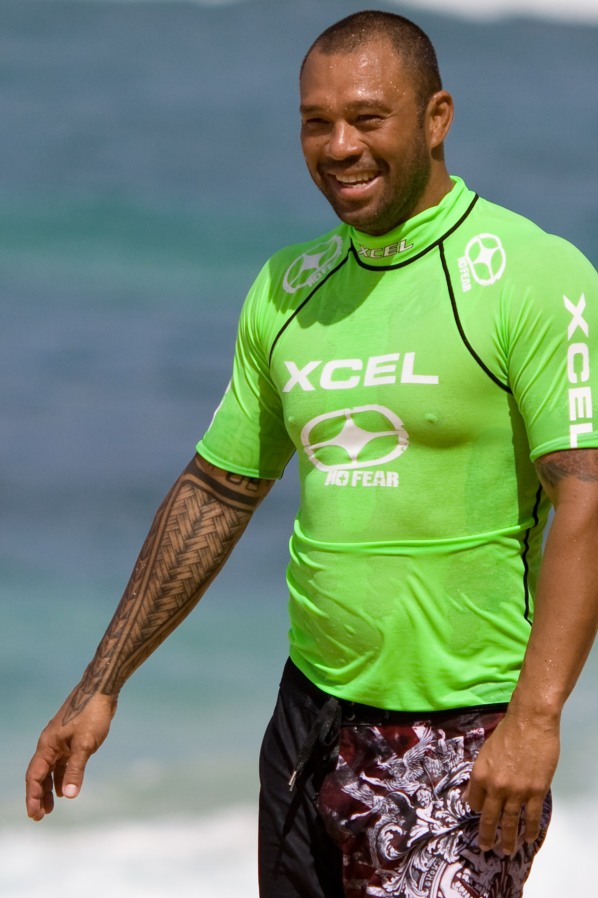 Sunny Garcia en 2007 a sunset beach